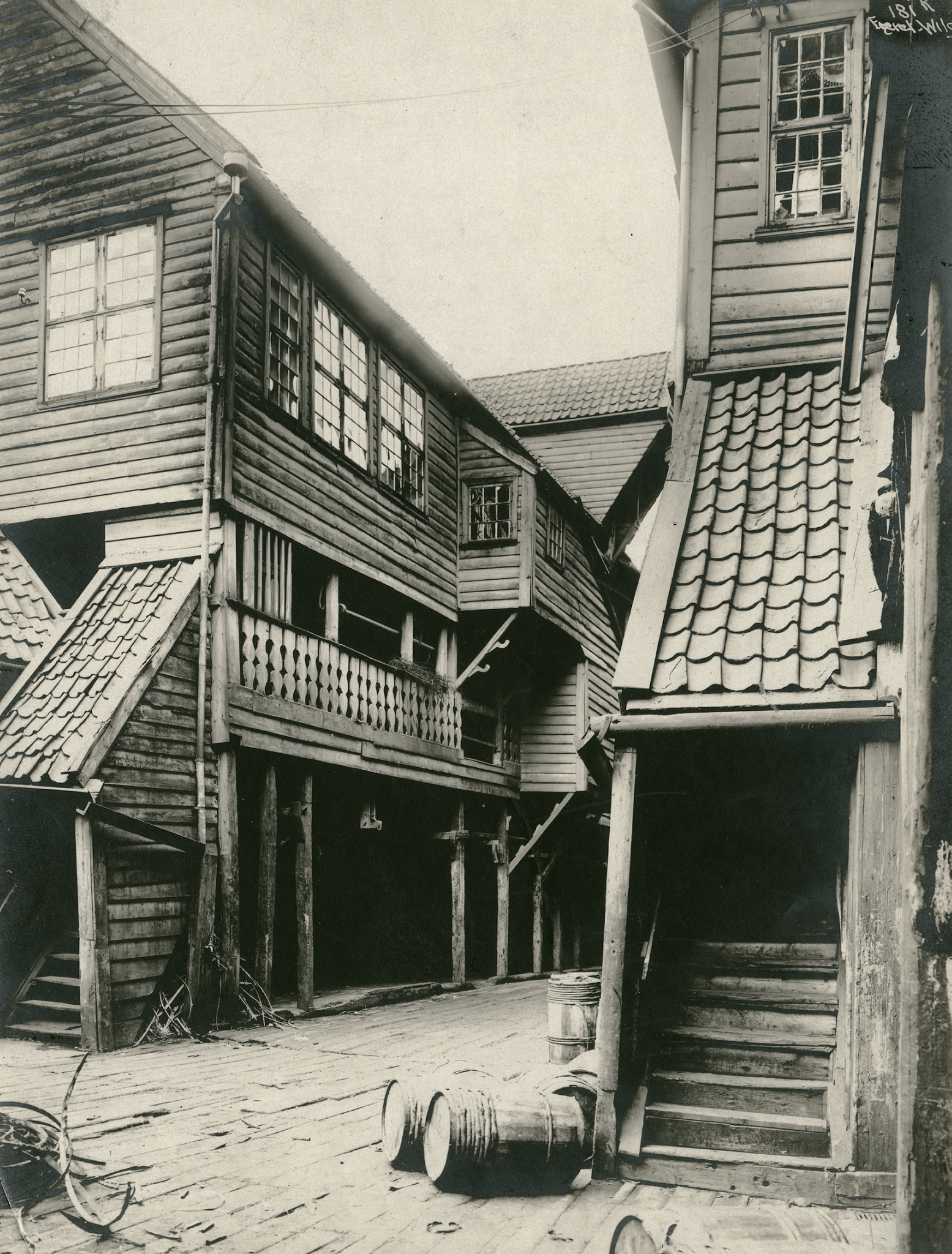 Bellgården (Bryggen) Oppført etter brannen i 1702 i gammel skikkelse Fotograf: Wilse, Anders Beer (1865-1949) Datering: Sted: Bergen Hordaland Se flere bilder på Kulturminnebilder